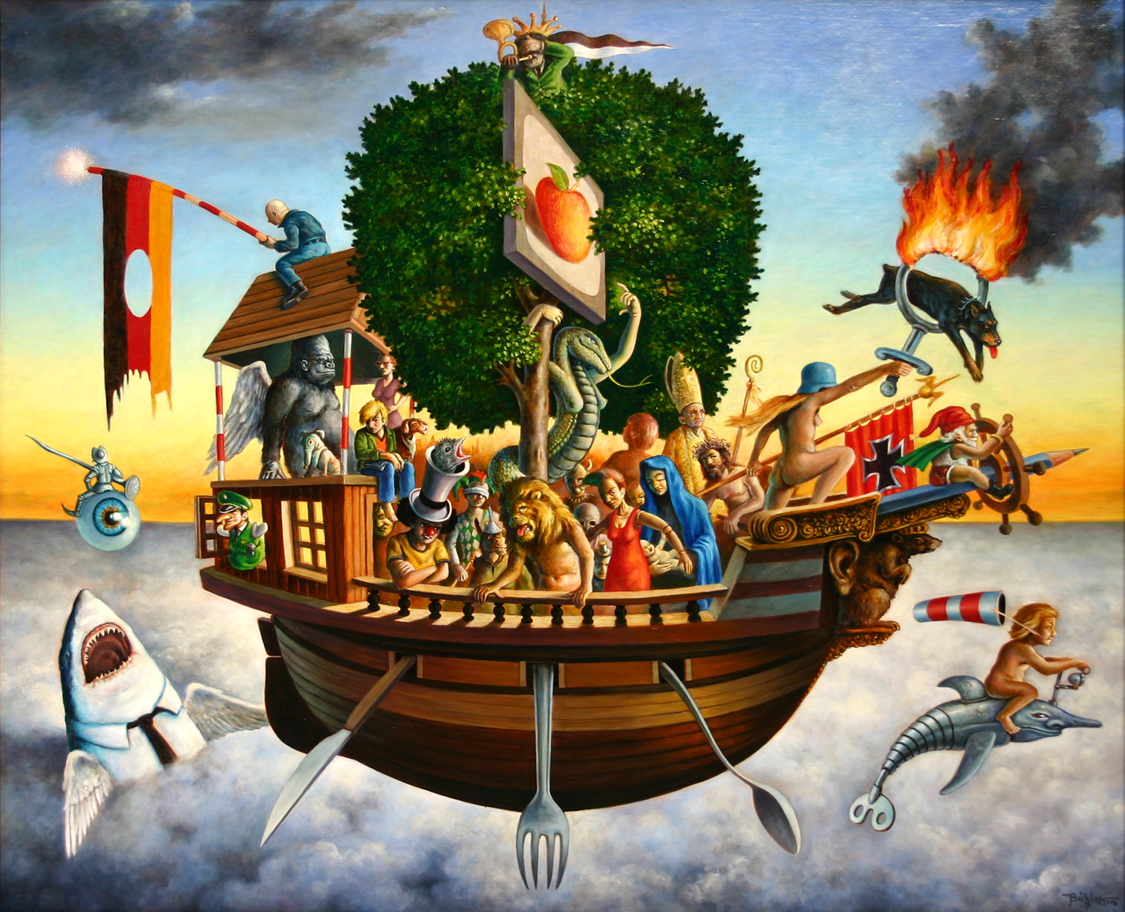 Narrenschiff, Ölbild Thomas Bühler. Beschreibung des Bilds durch das Presse- und Informationsamt Osnabrück